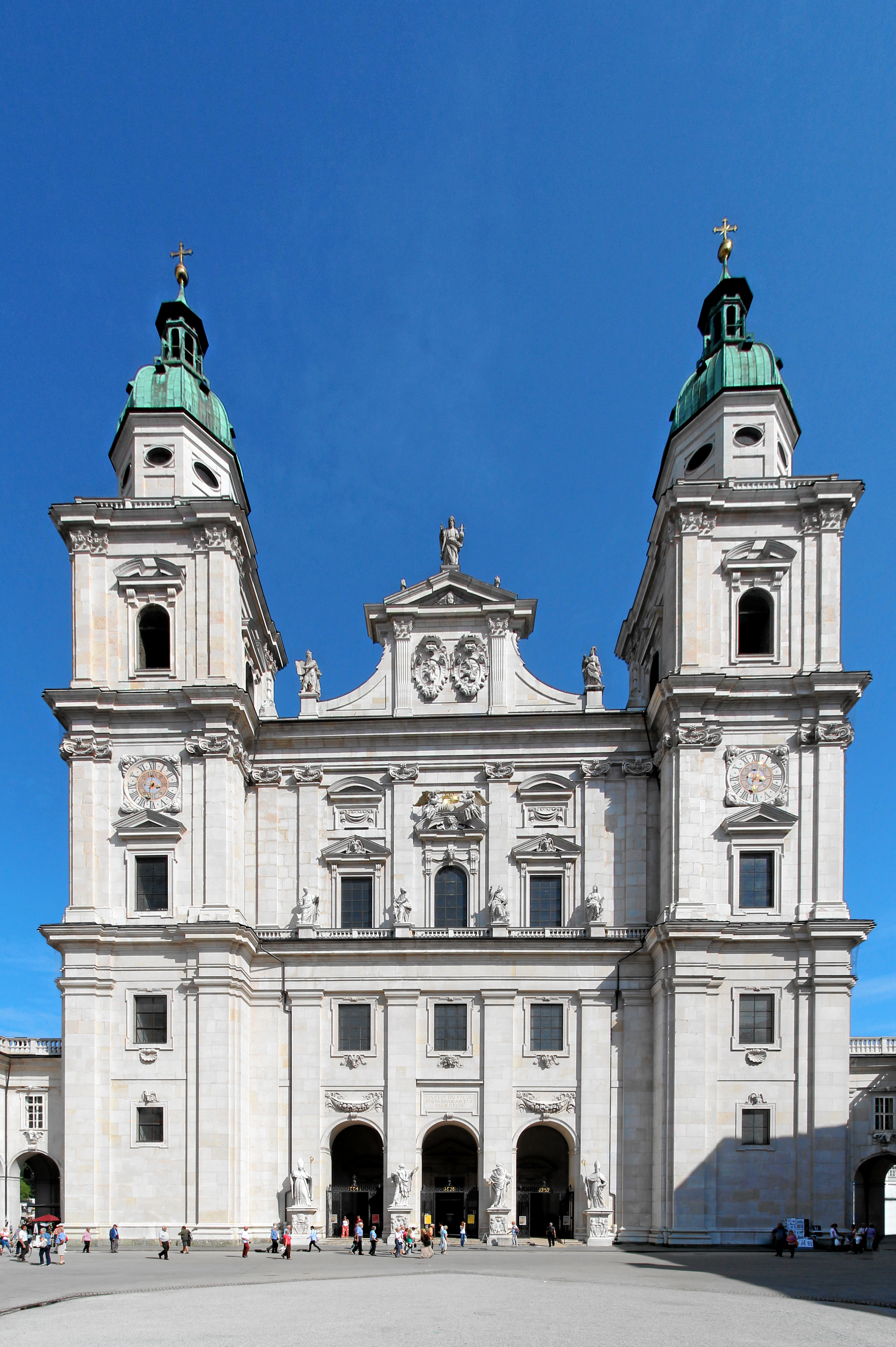 Fassade des Salzburger Doms im September 2014